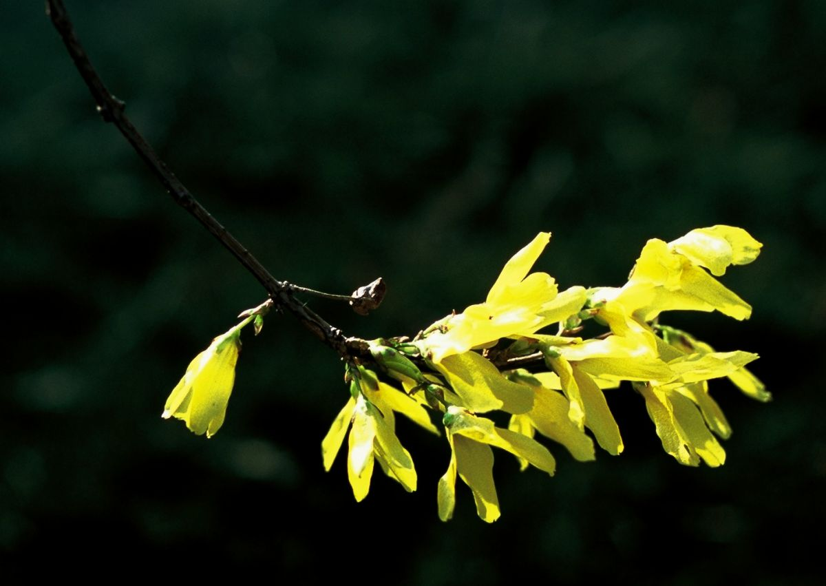 Forsythia sp. Michał Gleń